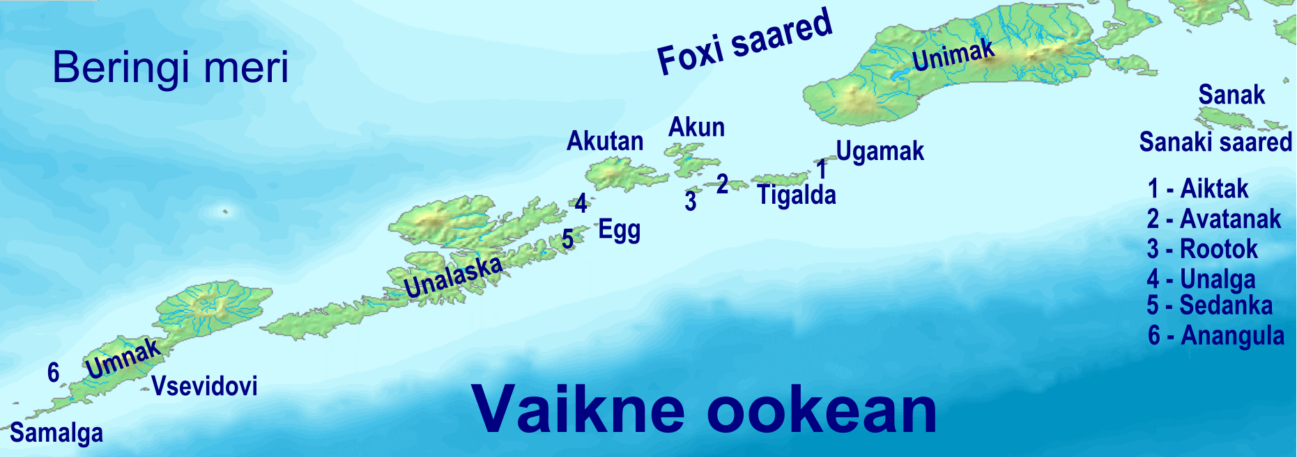 Foxi saarte (Aleuutide idaosa) kaart. Tehtud kaardi alusel